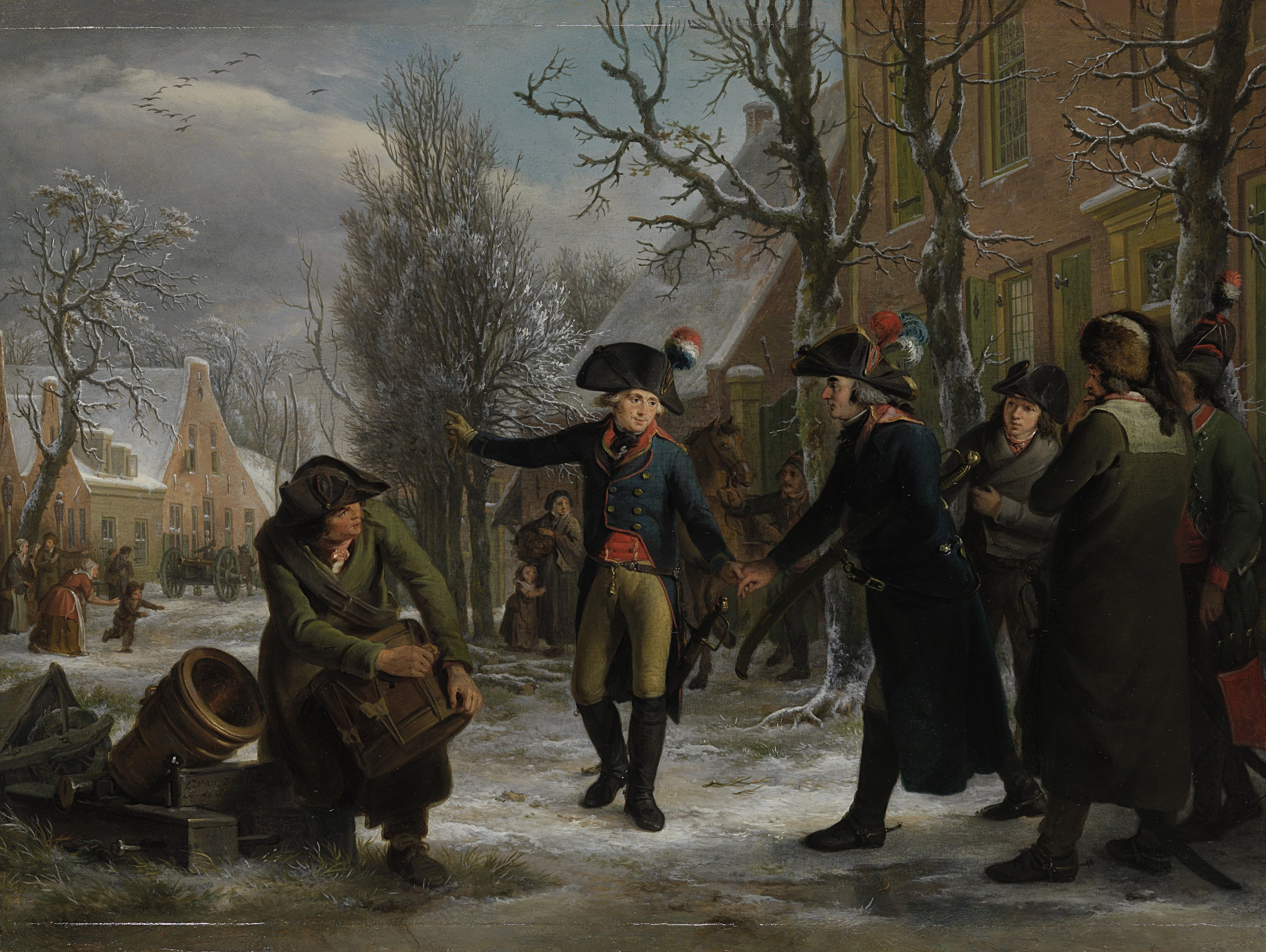 Generaal Daendels neemt te Maarssen afscheid van luitenant-kolonel C.R.T. Krayenhoff, die naar Amsterdam wordt gezonden om een omwenteling in het stadsbestuur te bewerkstelligen, 18 januari 1795. Verder ook voorgesteld: de kolonel van der Mühl en de officier van de staf Jan Nagel. De handeling vindt plaats in de winter met sneeuw op de grond, links een man met een trommel voorovergebogen staande bij een mortier. Op de achterzijde is een manuscript uit 1834 bevestigd waarin de voorstelling wordt verklaard.; Adriaan de Lelie (1755-1820), Egbert van Drielst (1745-1818), olieverf op paneel, 1795